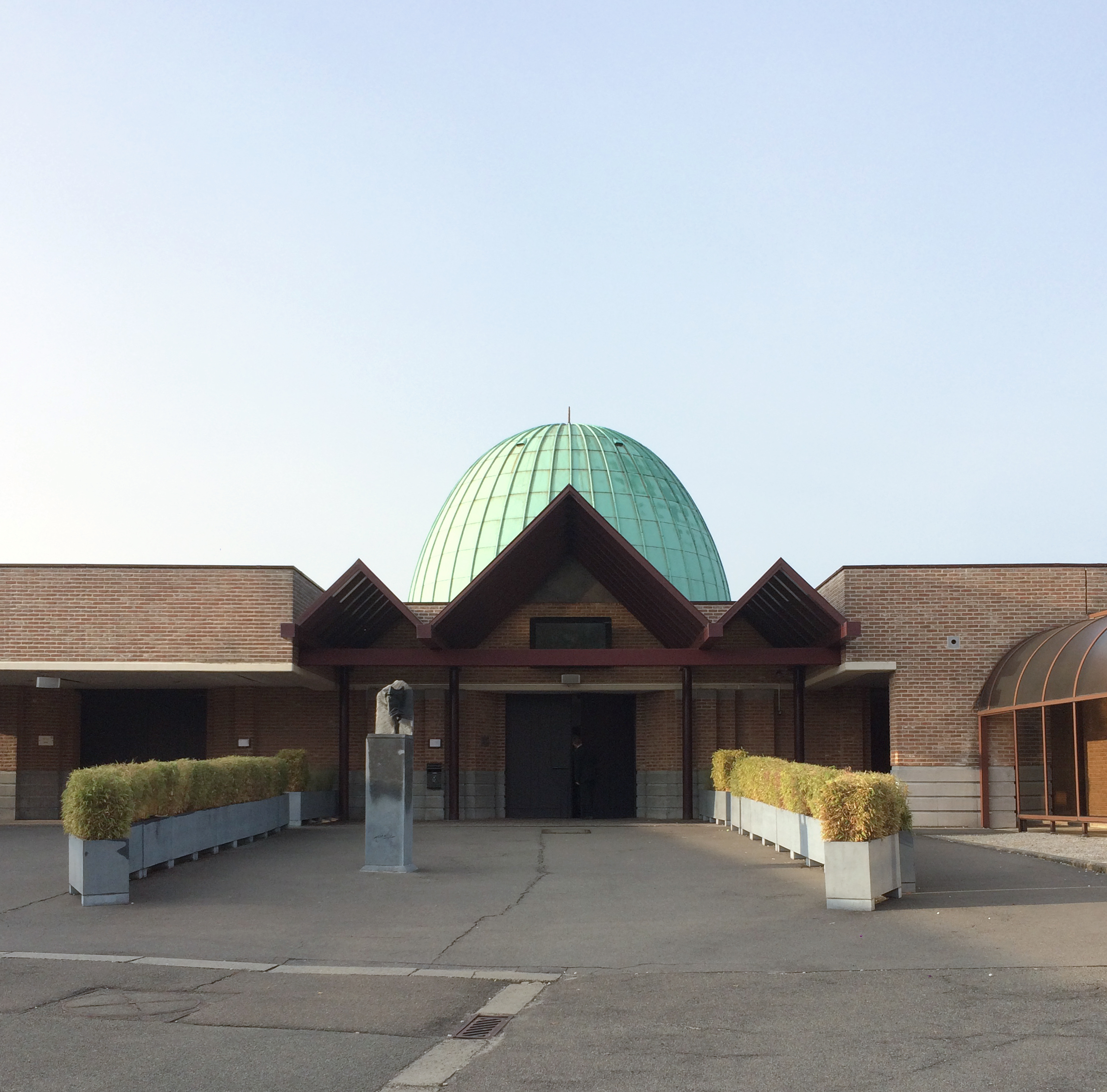 Entree du Crematorum d'Uccle, coupole de Lucien De Vestel